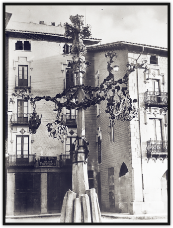 Farola diseñada por Gaudí, Vic, destruida en 1924.